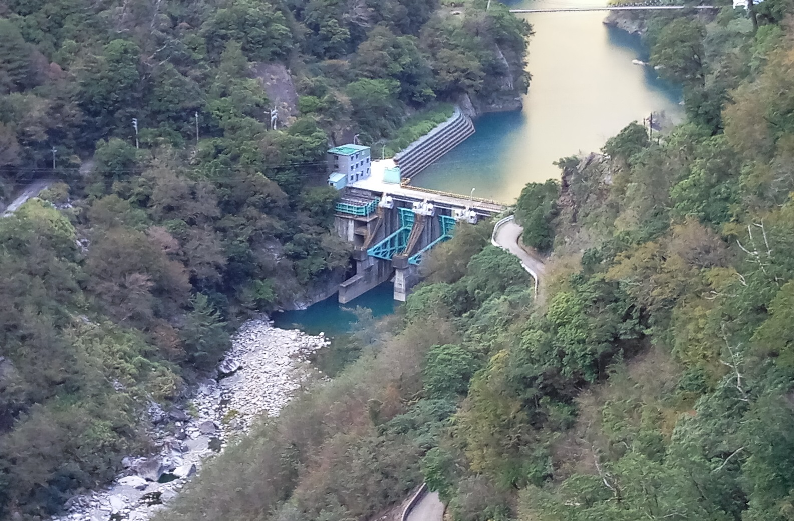 台電大甲溪發電廠青山壩遠觀